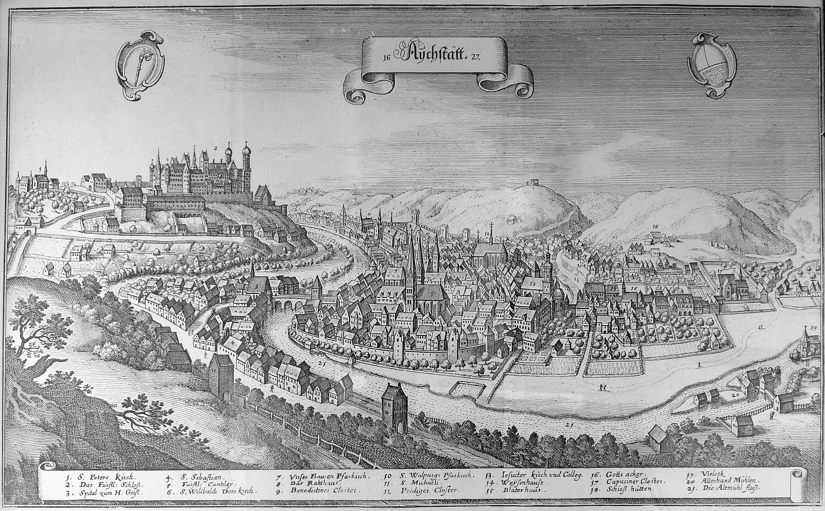 Eichstätt 1627, Stadtansicht mit Altmühl und Willibaldsburg von Matthäus Merian. Fotografie eines Reprints in der Willibaldsburg.